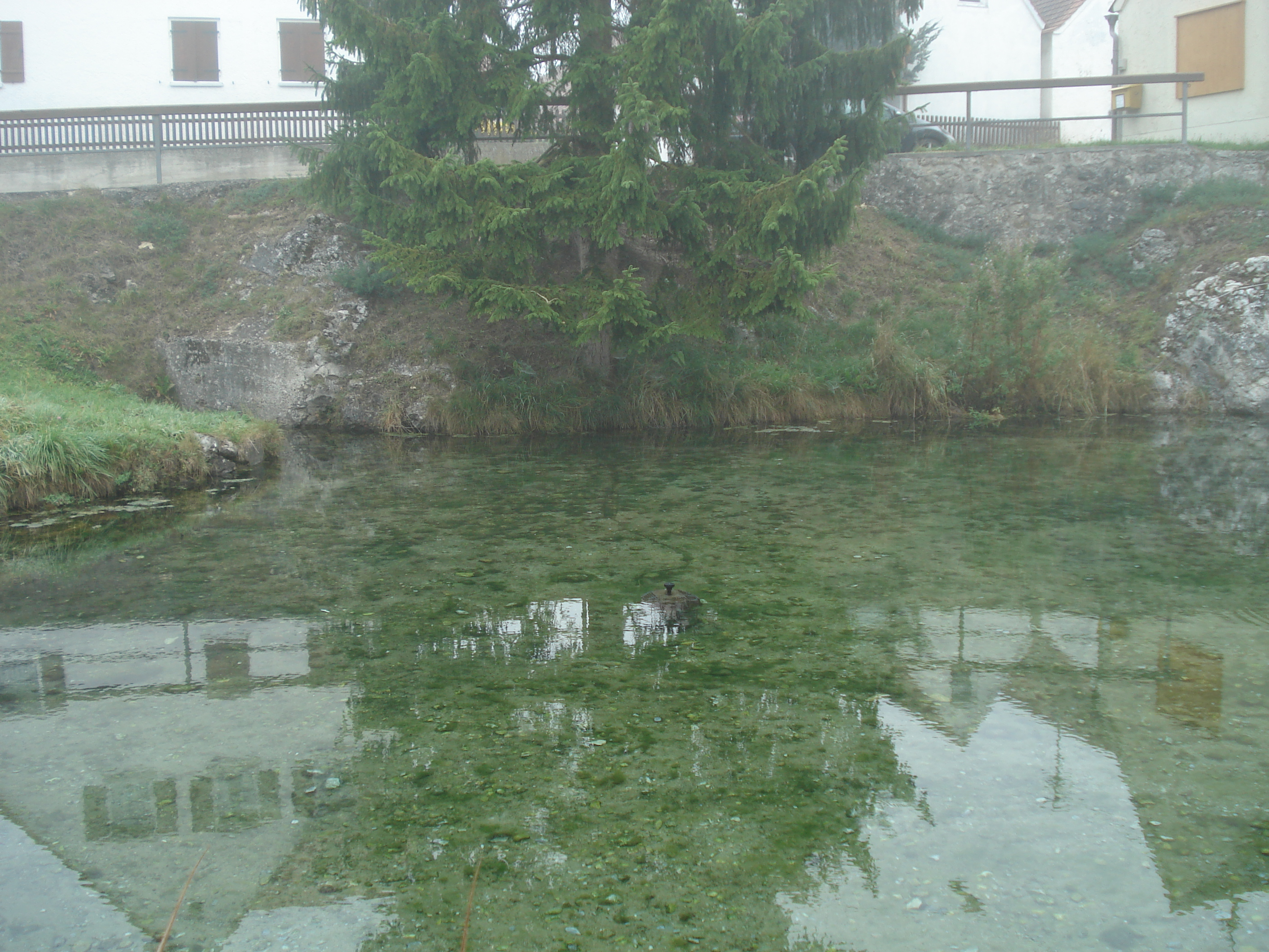 Die Karstquelle in Brünsee